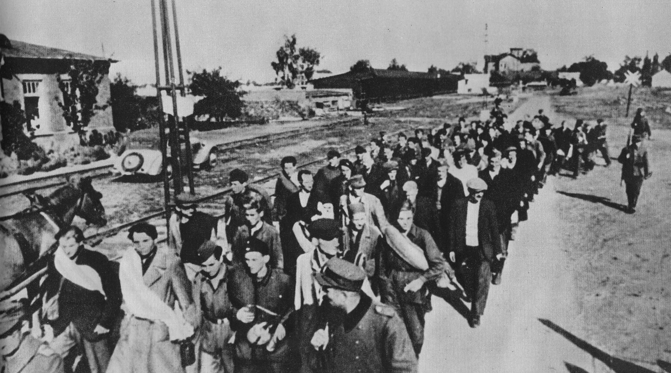 Grupa powstańców warszawskich po kapitulacji w Pruszkowie